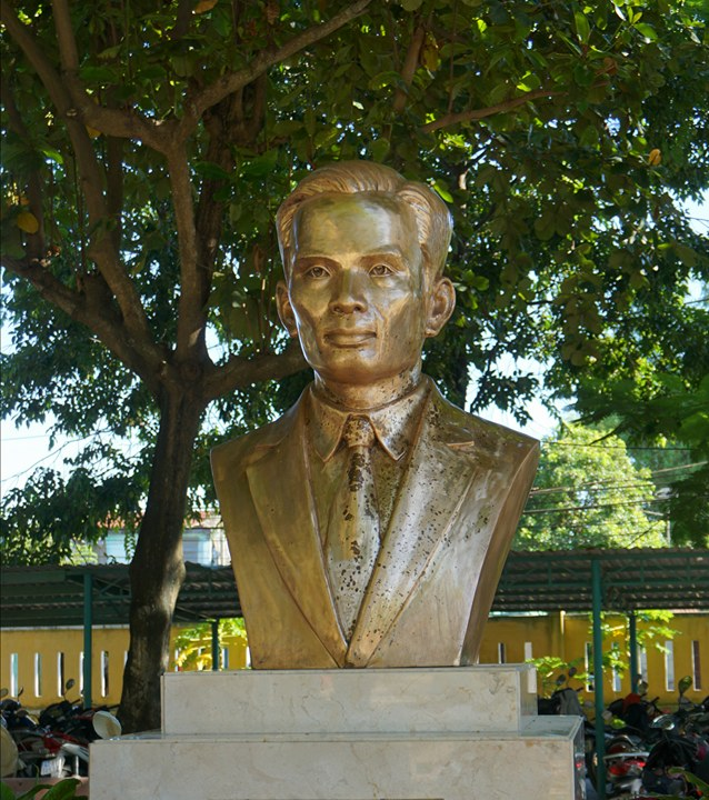 Ảnh do tôi chụp